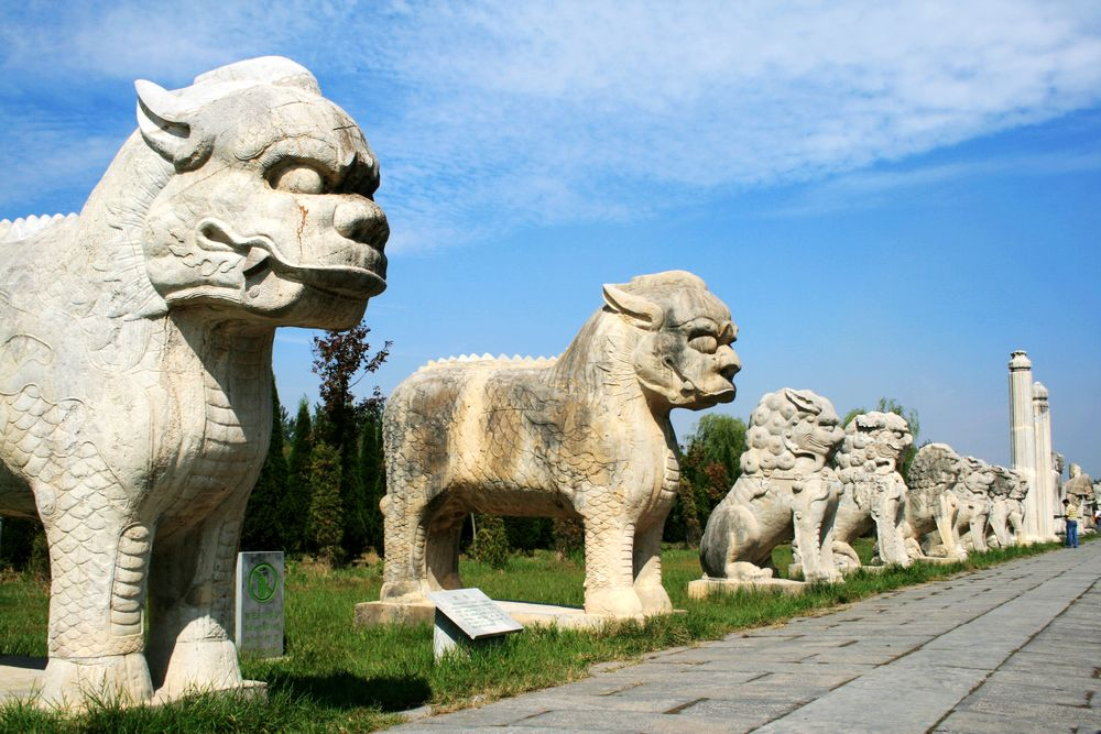 明祖陵